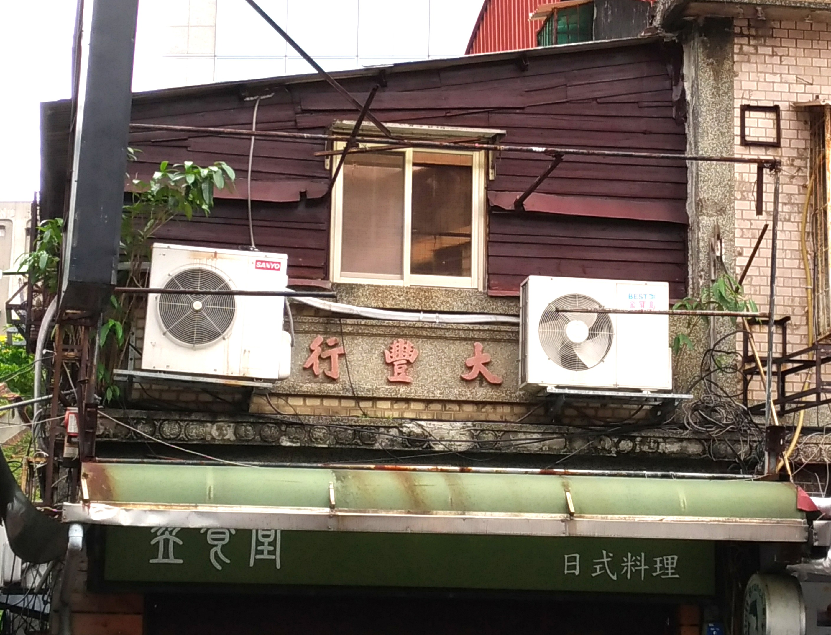 李水（民國前19年10月22日-民國57年8月12日）。 甲種公職候選人考試及格。曾任臺北市第七信用合作社理事主席、臺北市古亭區合作社理事、城南住宅公用合作社理事、臺北工業股份有限公司董事、大豐行營造廠負責人、臺北區營造工業同業公會顧問、臺北市國都戲院股份有限公司董事長。 民國57年8月12日病逝。總統蔣中正特頒「樂善流徽」輓額，由谷正綱擔任治喪委員會主任委員，蔣緯國、黃啟瑞、張祥傳擔任副主任委員。 79年被繼承人李水之遺產稅訴訟事件，曾創下有史以來最大金額之國庫額外收入（土地抵繳遺產稅）紀錄。